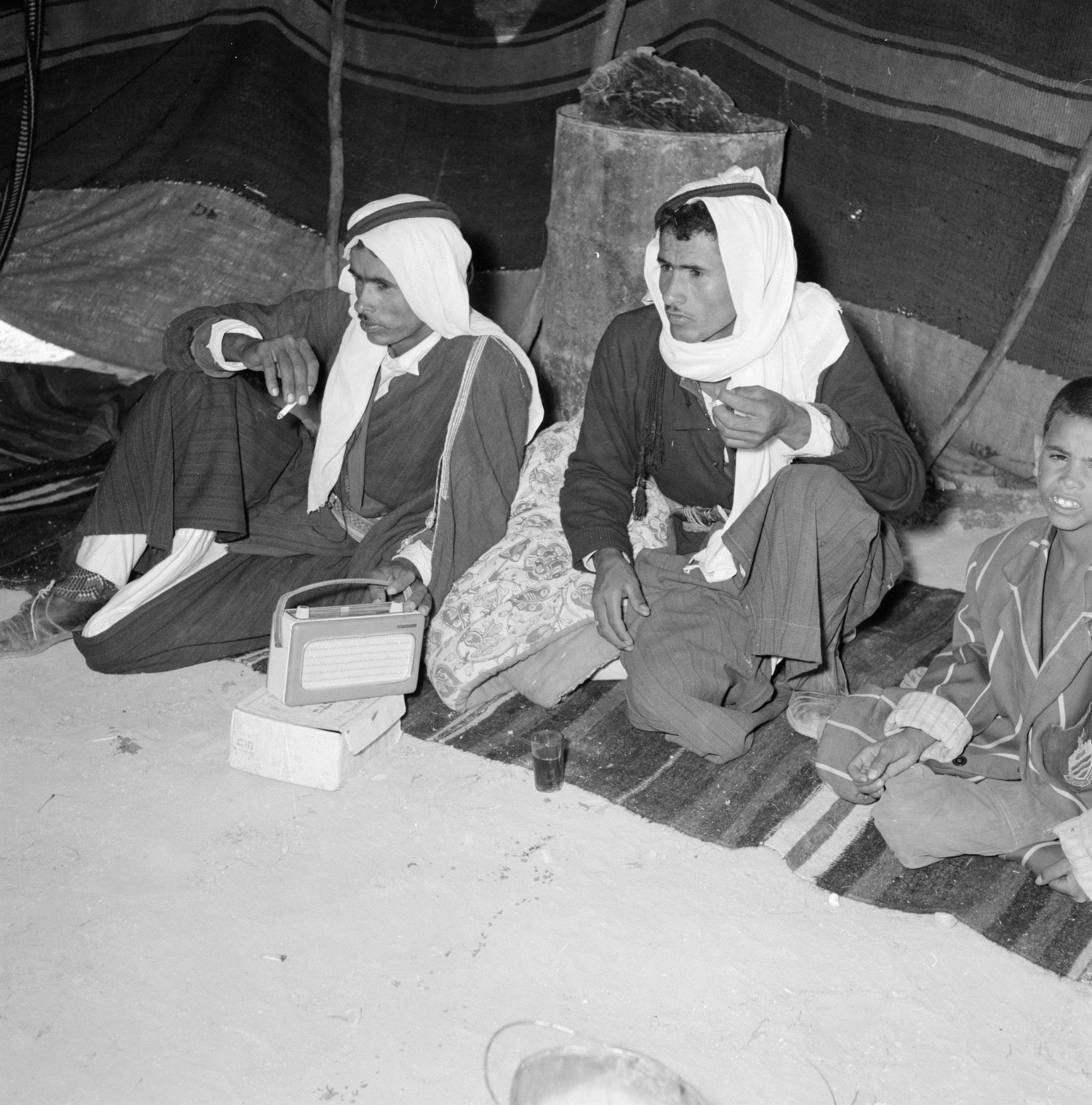 Collectie / Archief : Fotocollectie Van de Poll Reportage / Serie : Israël 1960-1965: bedoeïenen in Beersjewa (Beer Sheva) Beschrijving : Twee volwassen bedoeienen in een tent met een jongen luisterend naar een transistorradio Datum : 1 januari 1960 Locatie : Bersjeba, Israël Trefwoorden : bedoeïenen, radiotoestellen, tenten Fotograaf : Poll, Willem van de, [onbekend] Auteursrechthebbende : Nationaal Archief Materiaalsoort : Negatief (zwart/wit) Nummer archiefinventaris : bekijk toegang 2.24.14.02 Bestanddeelnummer : 255-3485